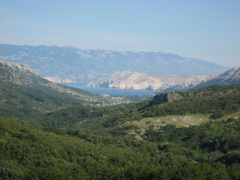 Bašćanska Draga, Krk, Croatia